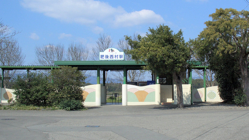 くま川鉄道湯前線ja:肥後西村駅 外観 撮影者/著者/著作権保有者 : MK Products (本人がアップロード) 撮影日 : 2007/03/14 肥後西村駅用にアップロードした画像です。良い画像があれば別の画像に変えてください。 Category:鉄道駅画像 Category:錦町_(熊本県)_の画像